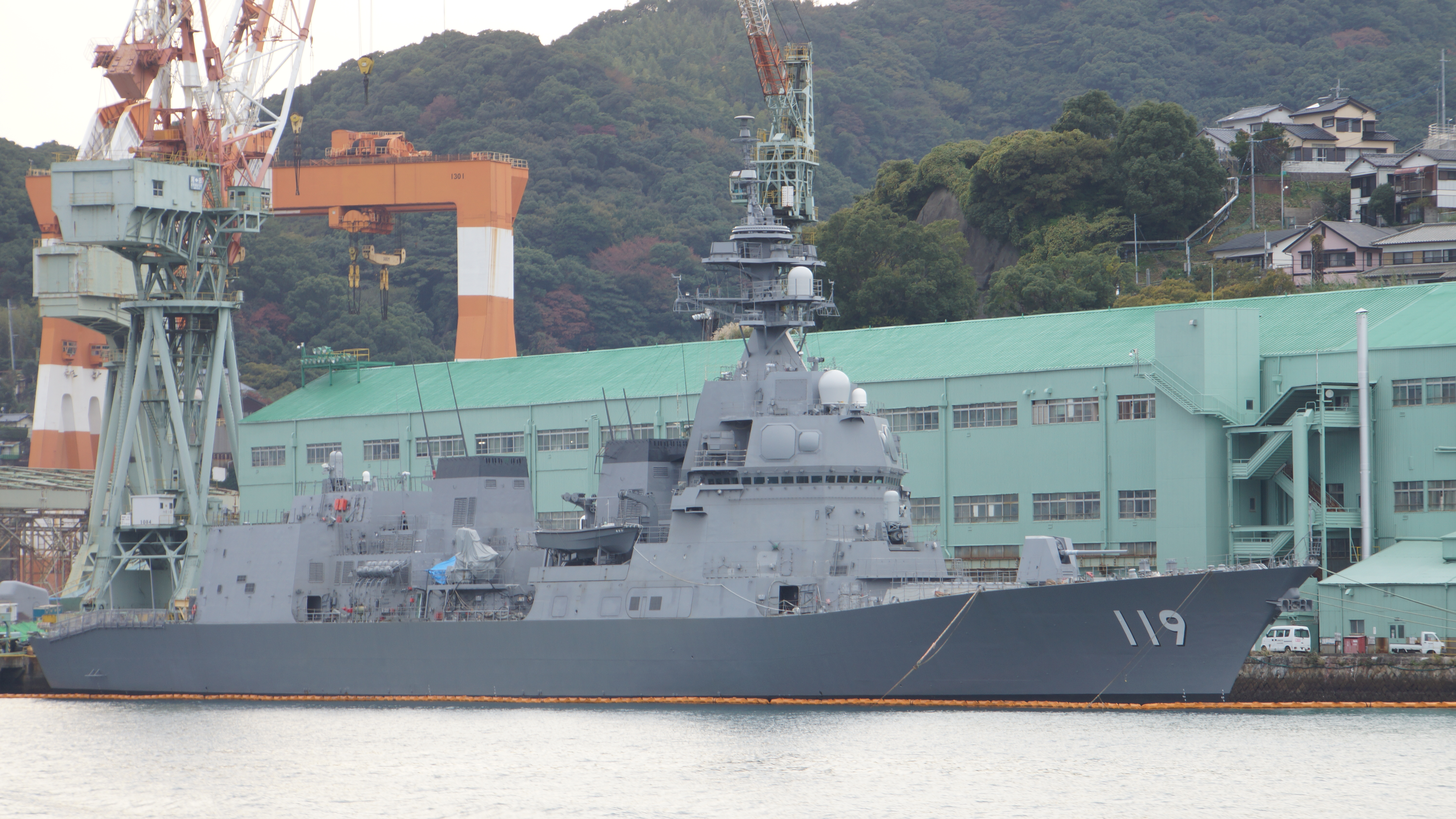 海上自衛隊 護衛艦あさひ（DD-119） 右舷前面。2017年11月25日 三菱重工業長崎造船所にて。